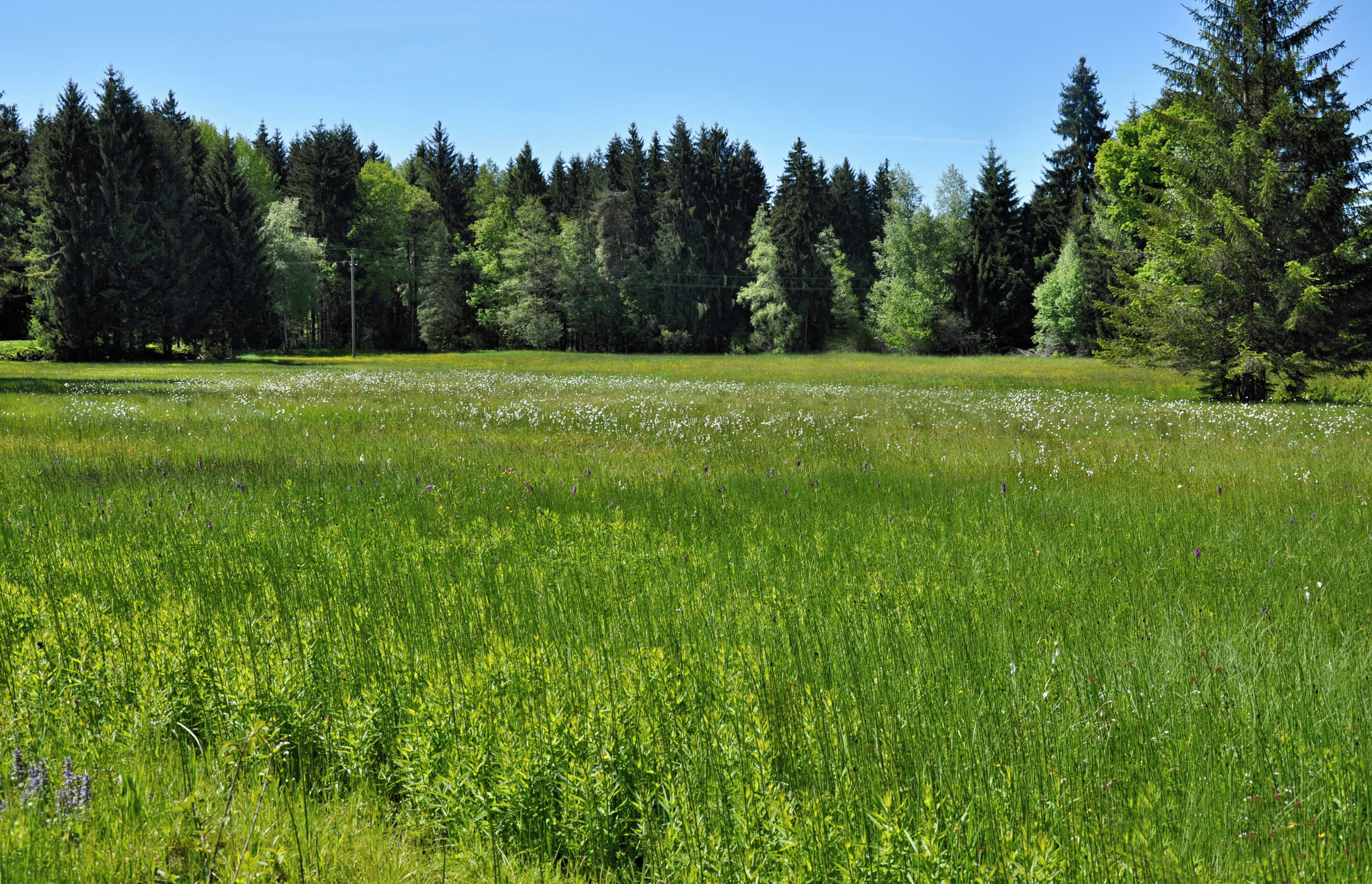 Hammermoos NO-st von Heimenkirch. Moorkomplex mit Scheiden- Wollgras (Eriophorum vaginatum), Sumpfschachtelhalm (Equisetum palustris), Gelbweiderich (Lysimachia vulgaris) und Breitblätterige Fingerwurz (Dactylorhiza majalis).